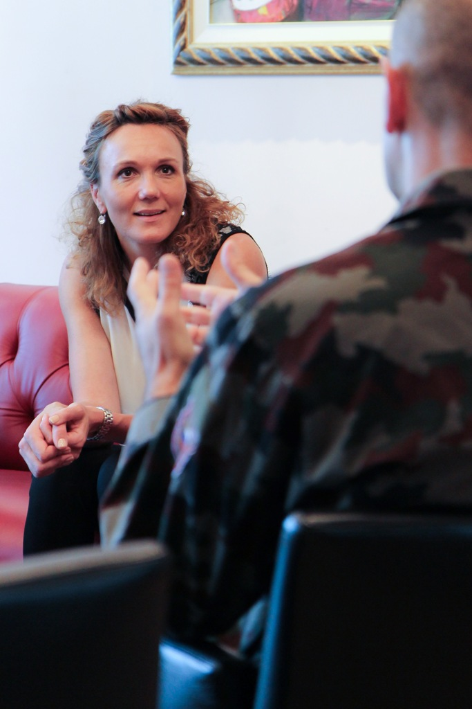 Sprejem za Petro Majdič na Ministrstvu za obrambo ob koncu poklicne kariere v Slovenski vojski